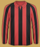 camiseta barracas ac